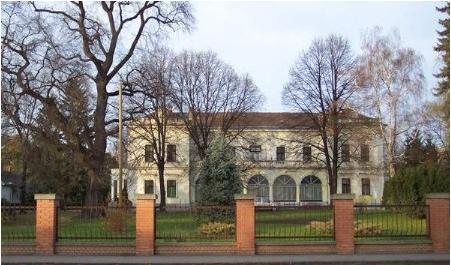 A Gencsy-kastély a Kossuth utcáról Balkányban